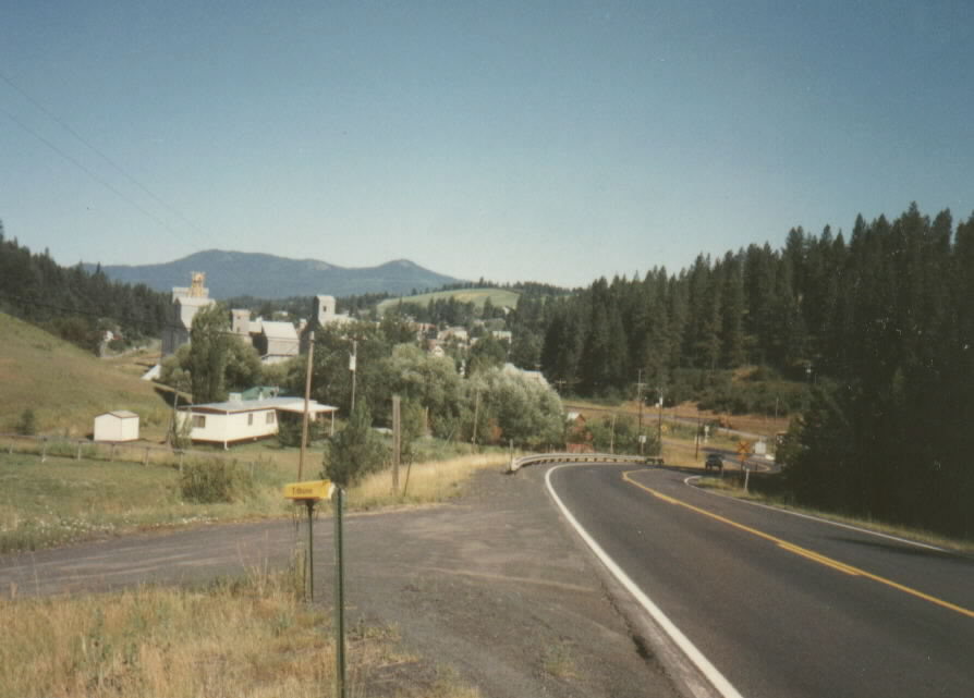 Near Kendrick, Idaho